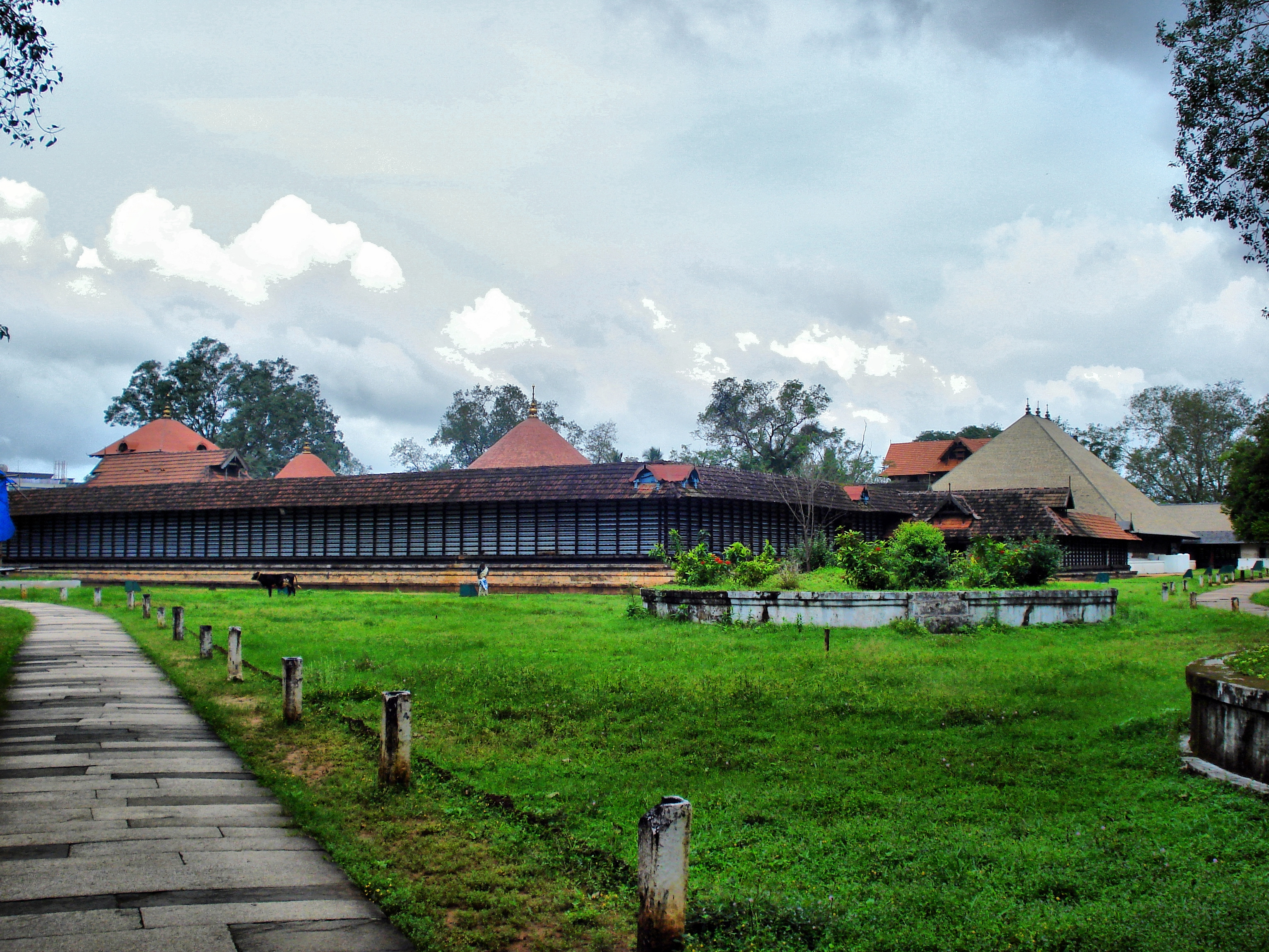 Main diety is Lord Shiva. U can see the koothambalam in d right end.